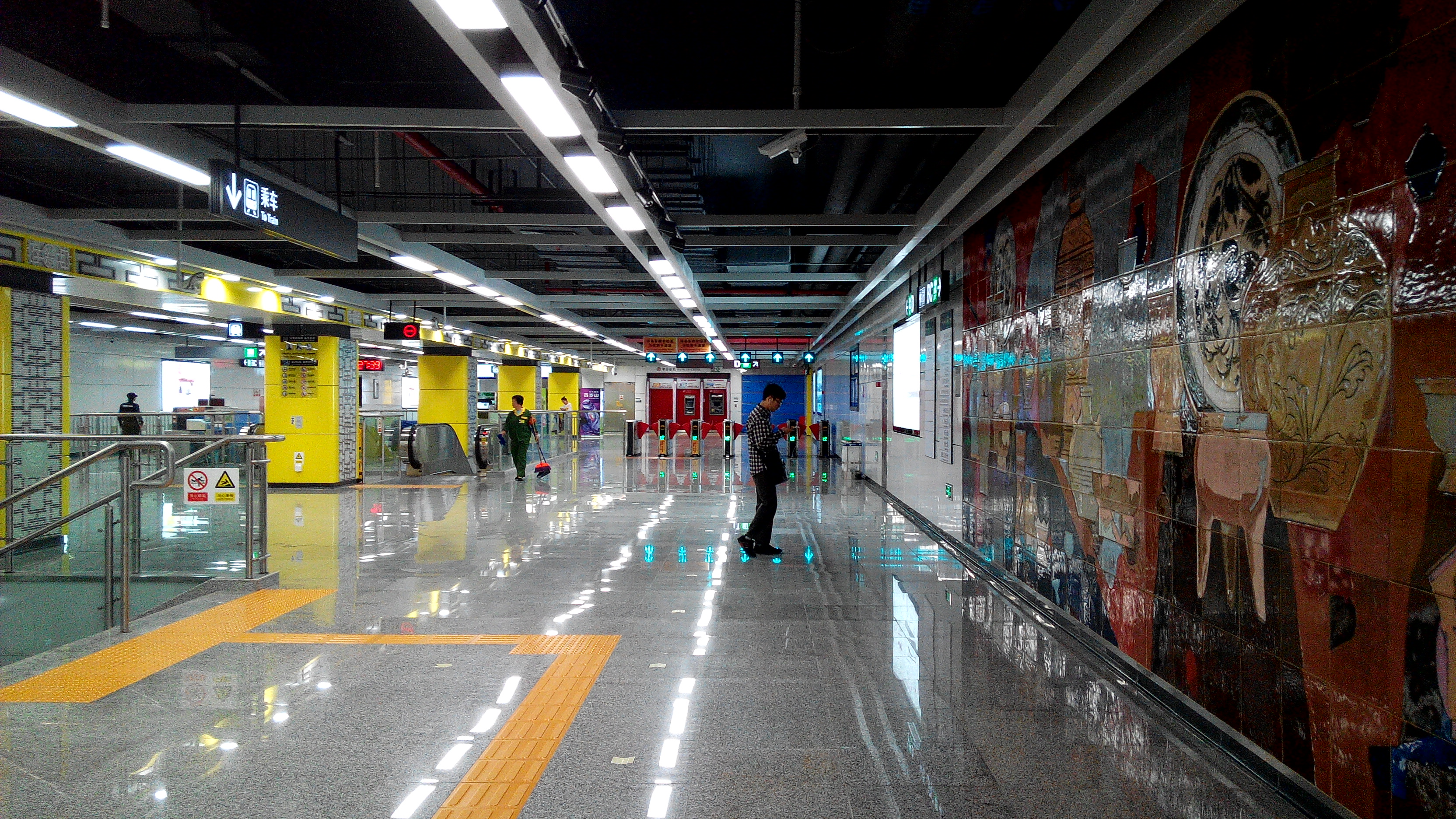 深圳地铁9号线 孖岭站大堂